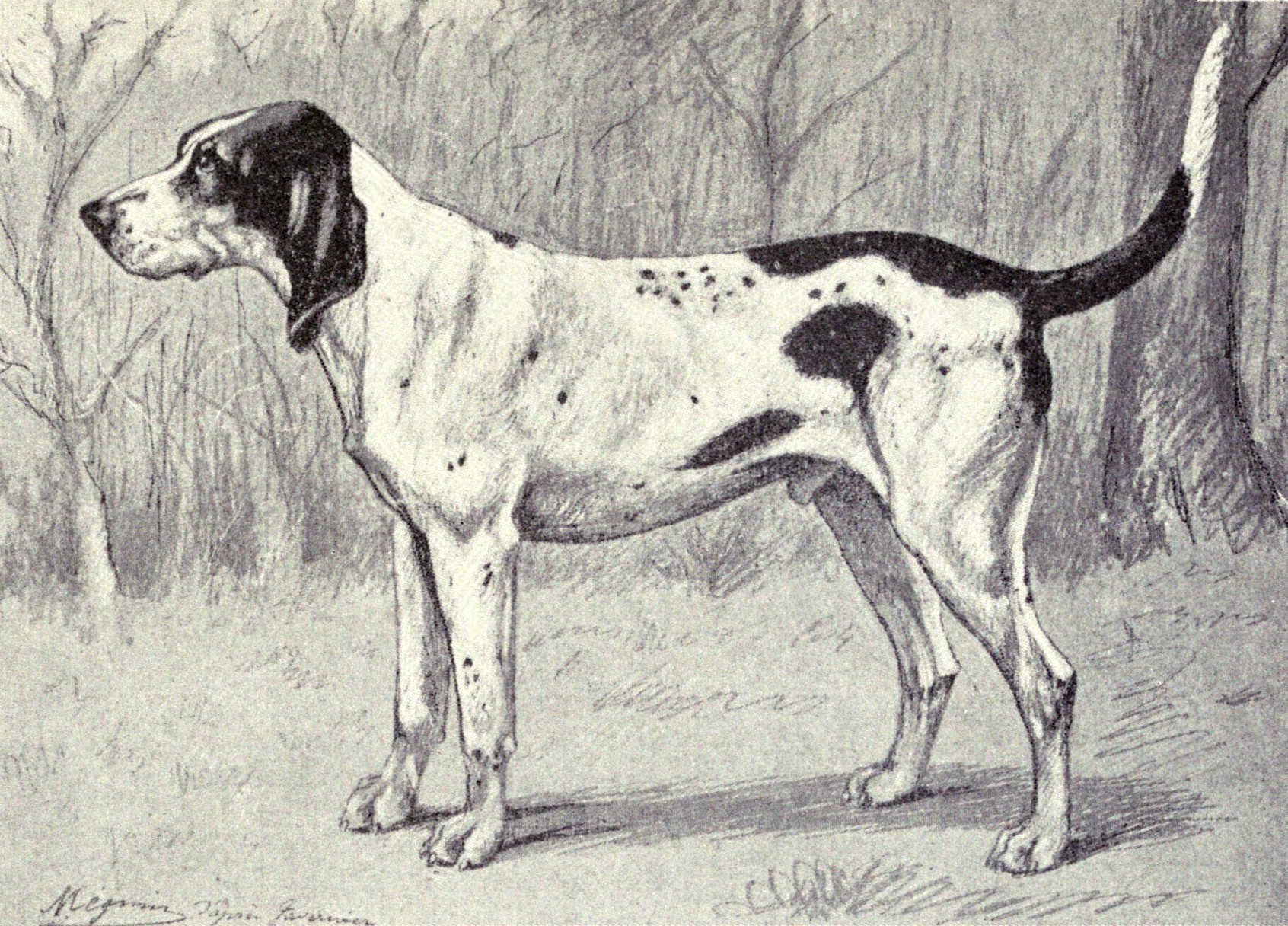 Virelade from 1915